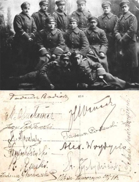 Zdjęcie z rodzinnego albumu datowane na 30.01.1918 r., Szkoła Podchorążych - Ostrów Maz. Komorowo, wśród nich Józef Mickiewicz.